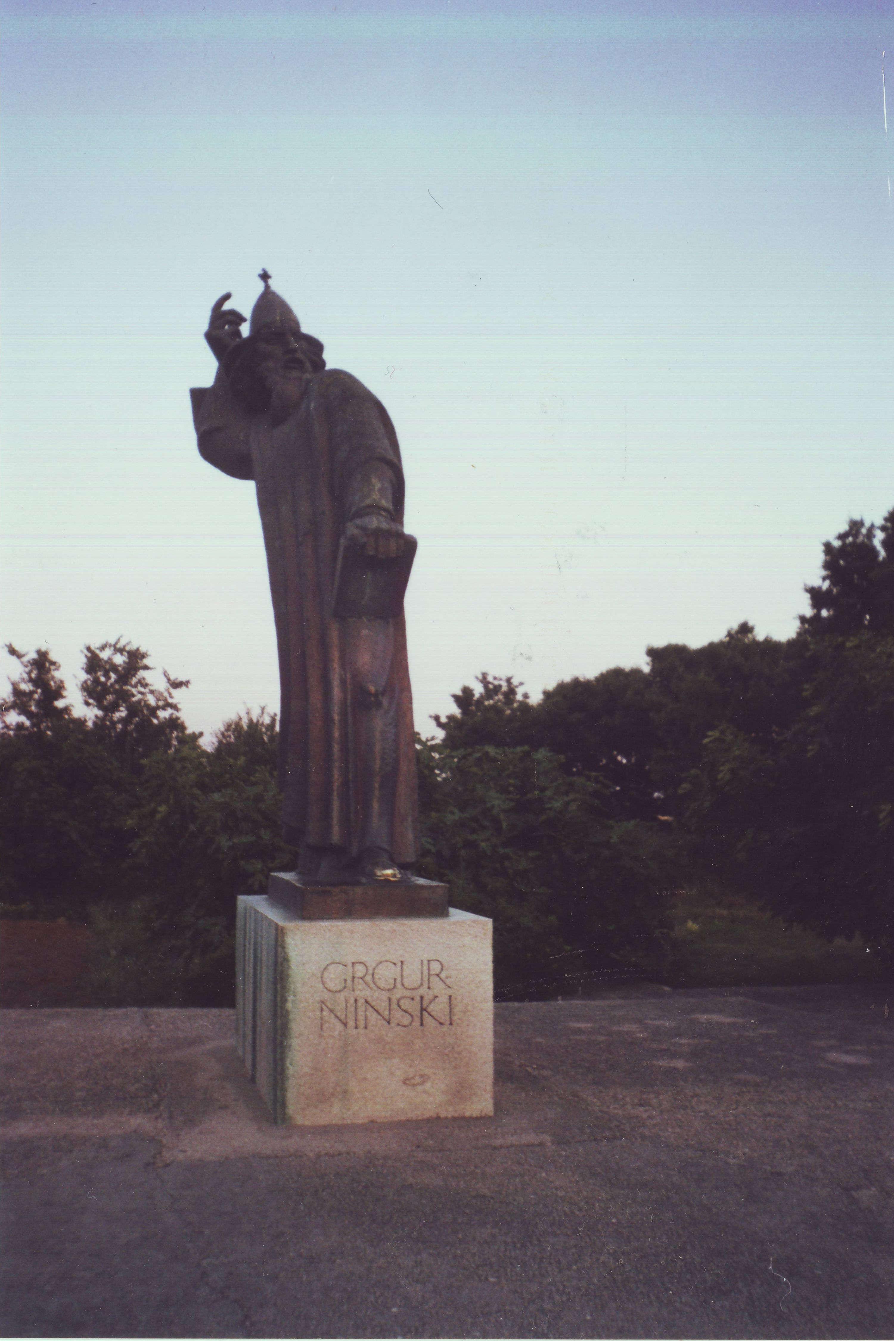 Kip Grgura Ninskog u Ninu